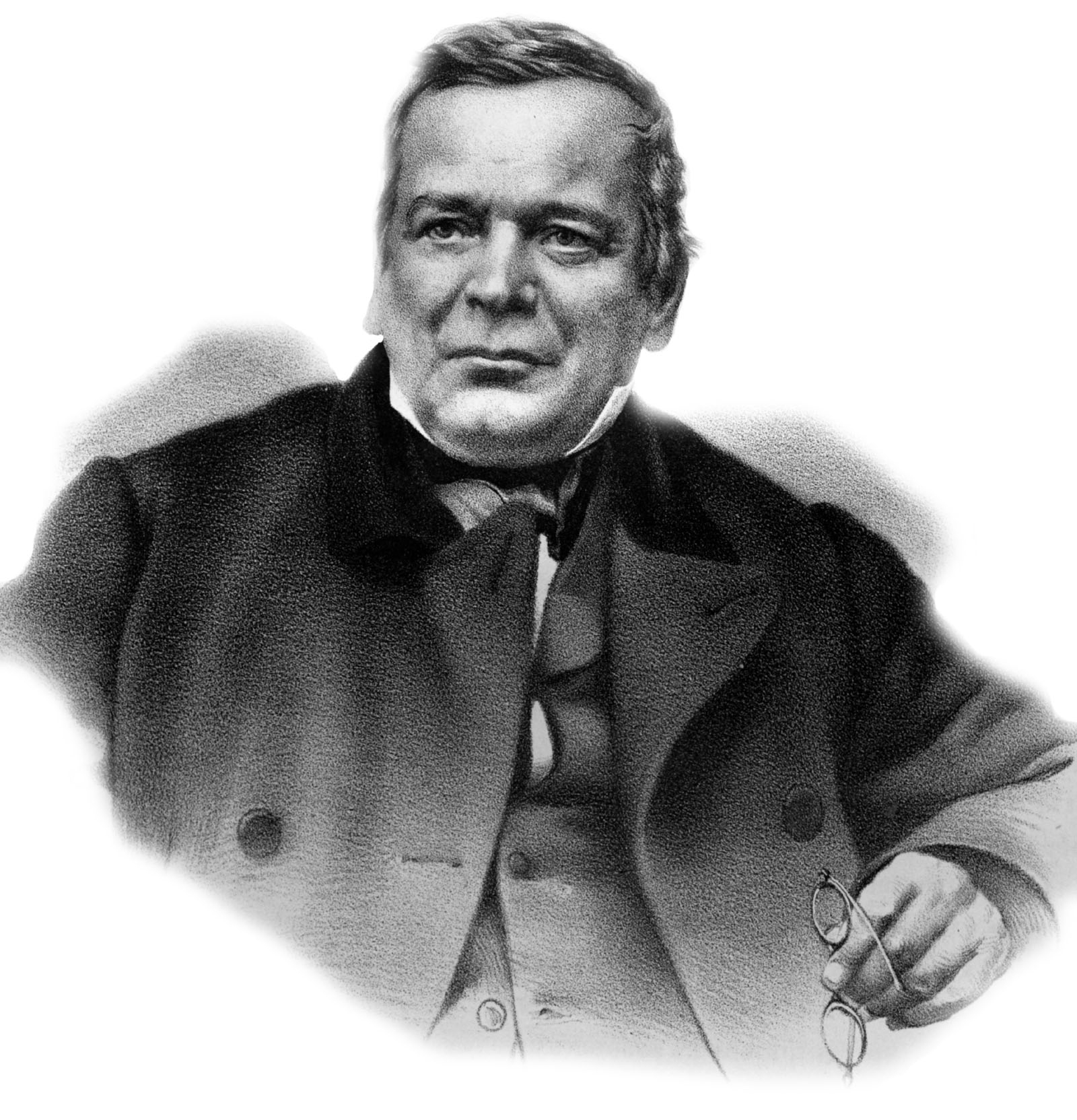 C. TONN. Съ Фотогр. портрета. Лит. А. Мюнстера, СПБ. Imp. Lith. A. Munster (Editeur)